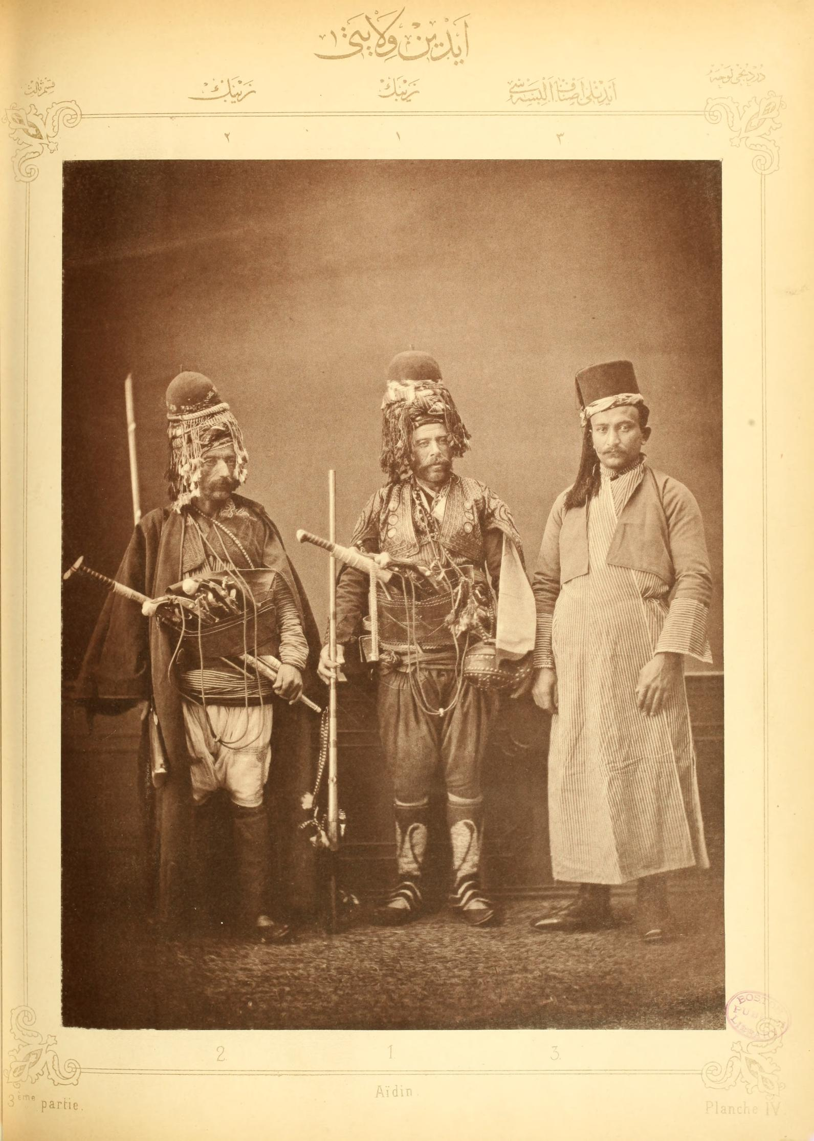 VILAYET D'AÏDIN PLANCHE IV: Zeïbek Artisan d'Aïdin